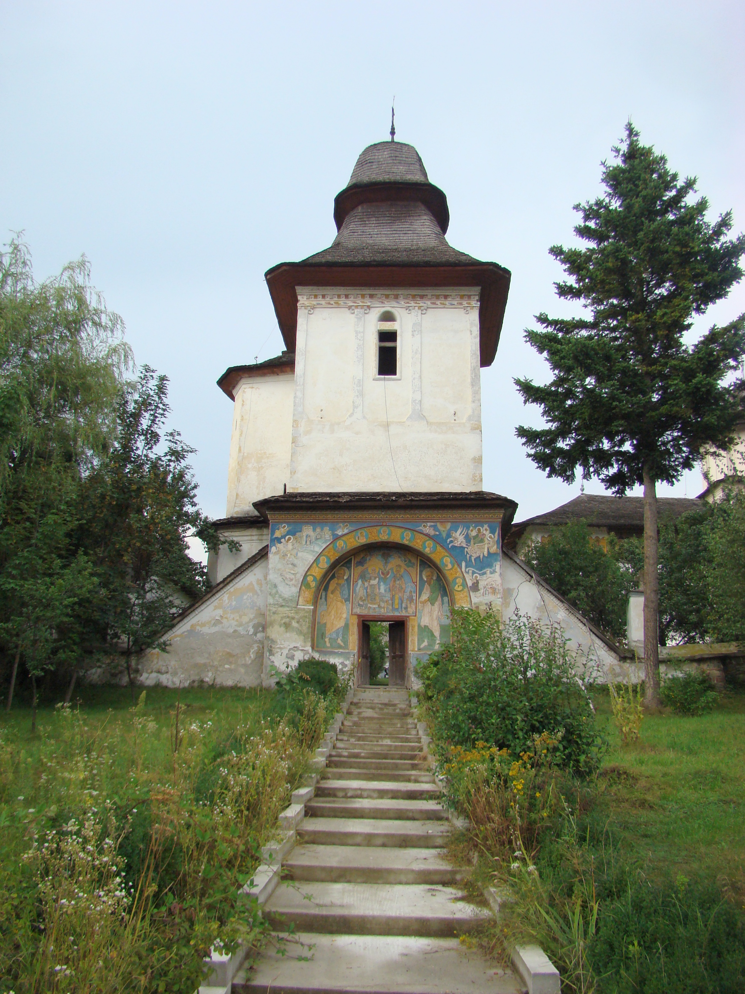 Ansamblul bisericii cu hramurile "Sf. Filofteia" și Sf. Nicolae", sat Valea Danului; comuna Valea Danului, județul Argeș